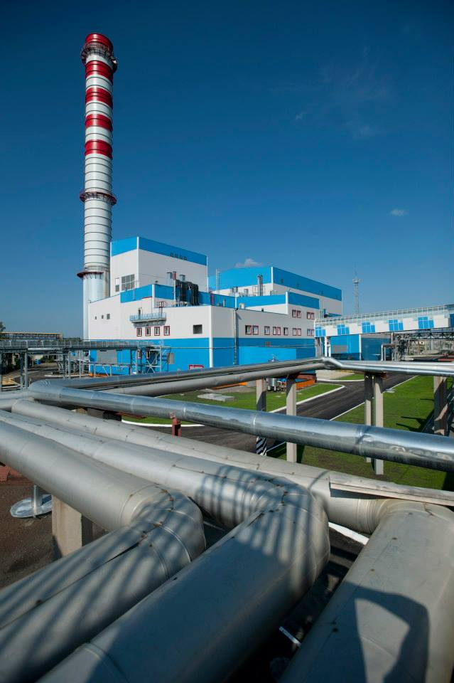 СУГРЭС